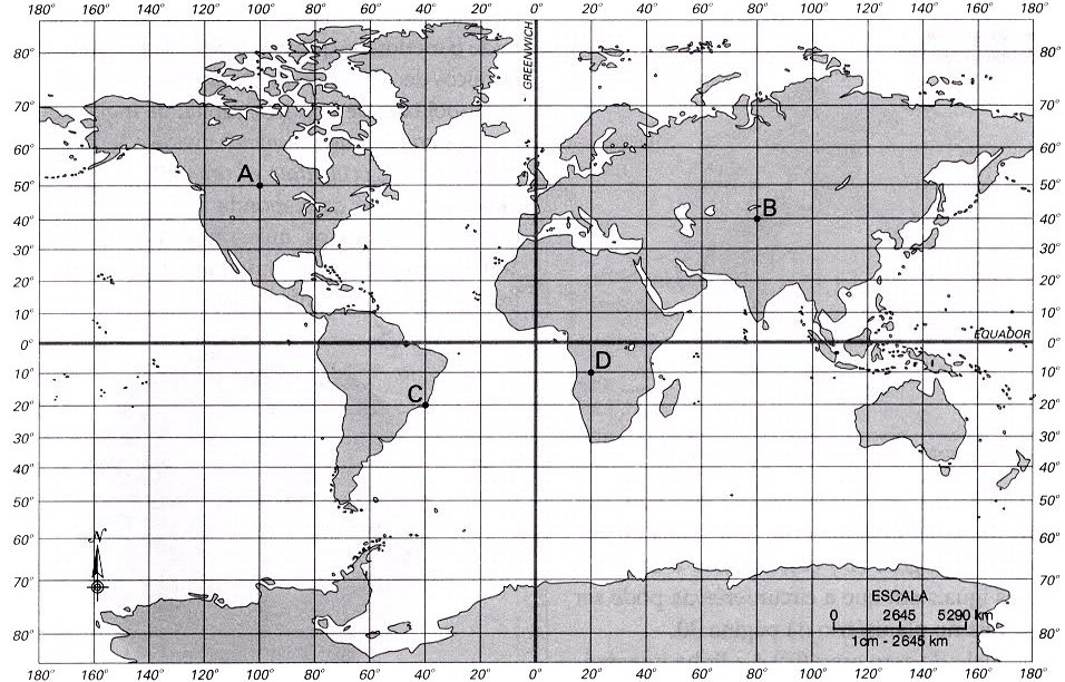 coordenadas didatico